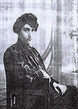 Shushanik Kurghinian (1876 - 1927)